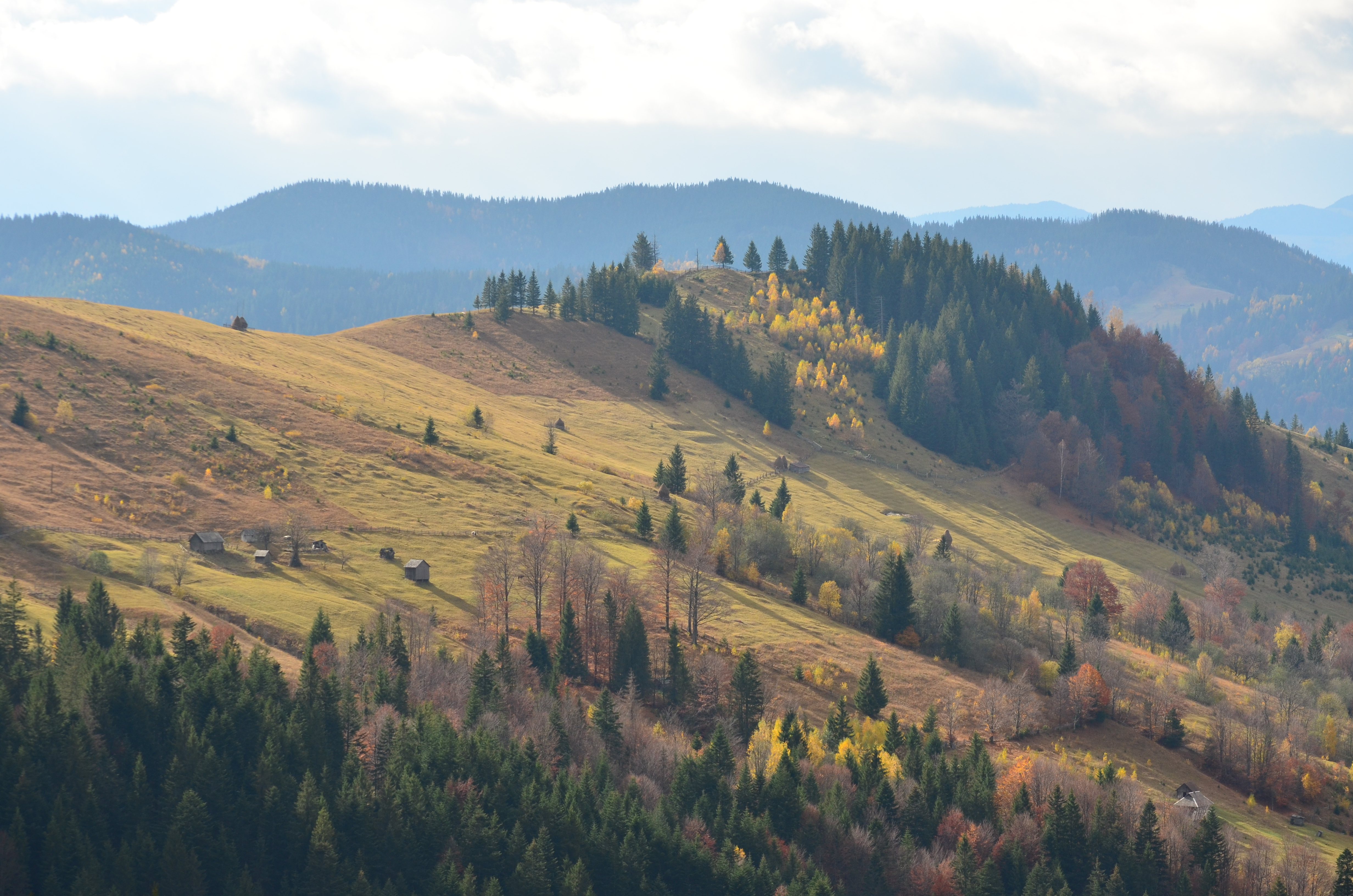 РЛП «Гуцульщина», Косівський район